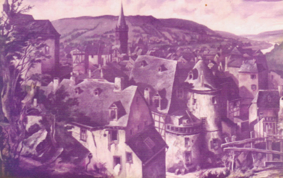 Zeichnung der Älteste Weinstube und des alten Stadturmes zur Vorstadt in Bergsattel-Kues